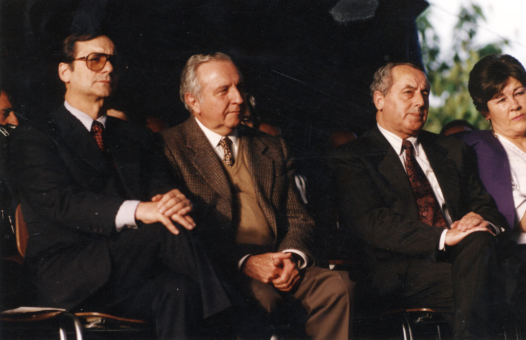 Sin fecha. Máximo Pacheco Gómez junto a Belisario Velasco.